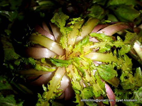 نباتات برية سورية تؤكل